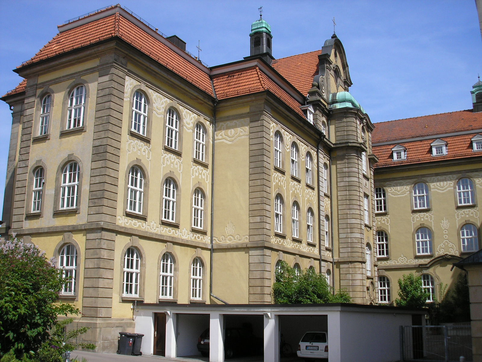 Das Gymnasium in Dingelstädt im Eichsfeld (Thüringen).